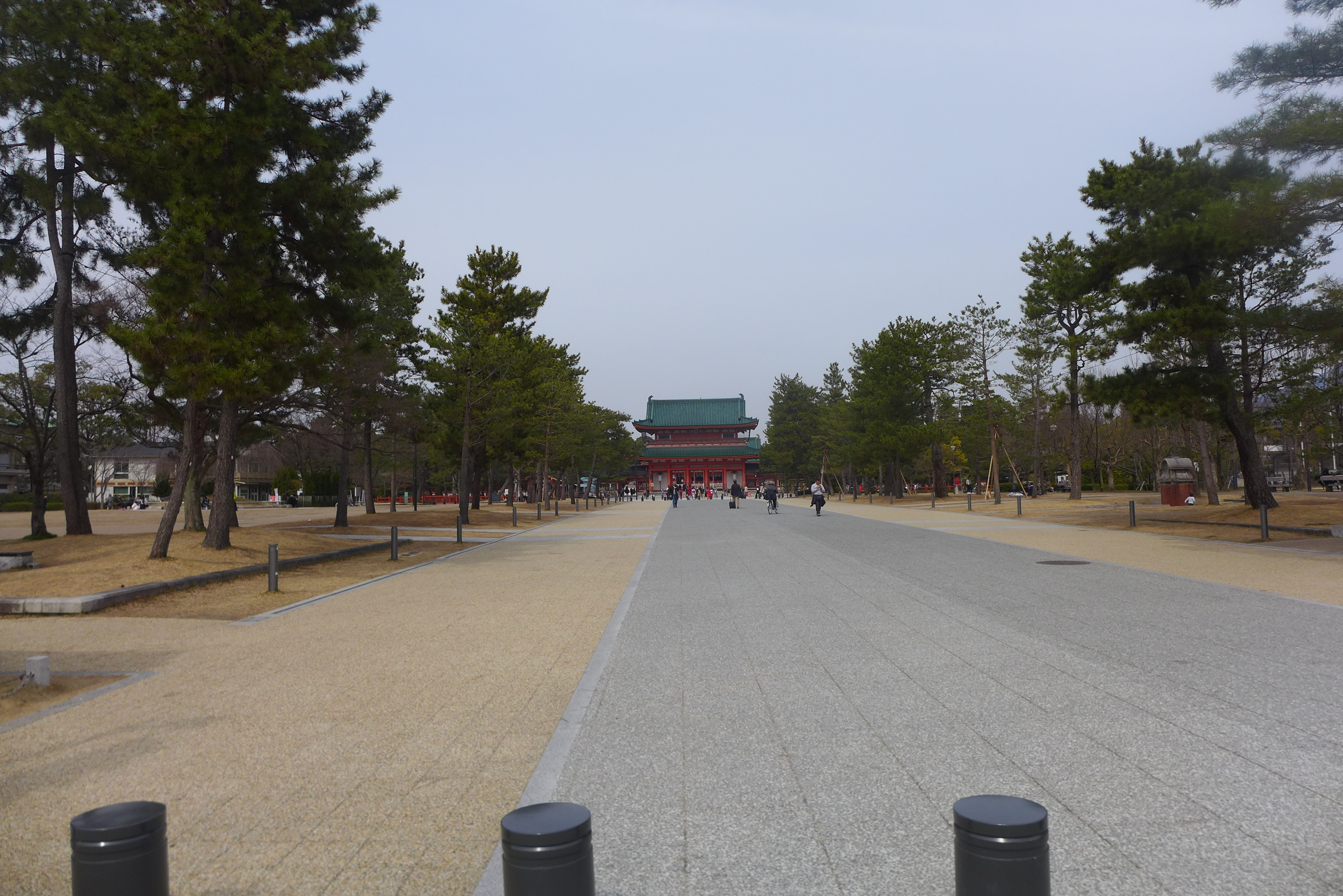 神宮道の二条通との交差点から北側の歩行者専用道路区間。手前に車止めの柵が、奥に平安神宮の応天門が見える